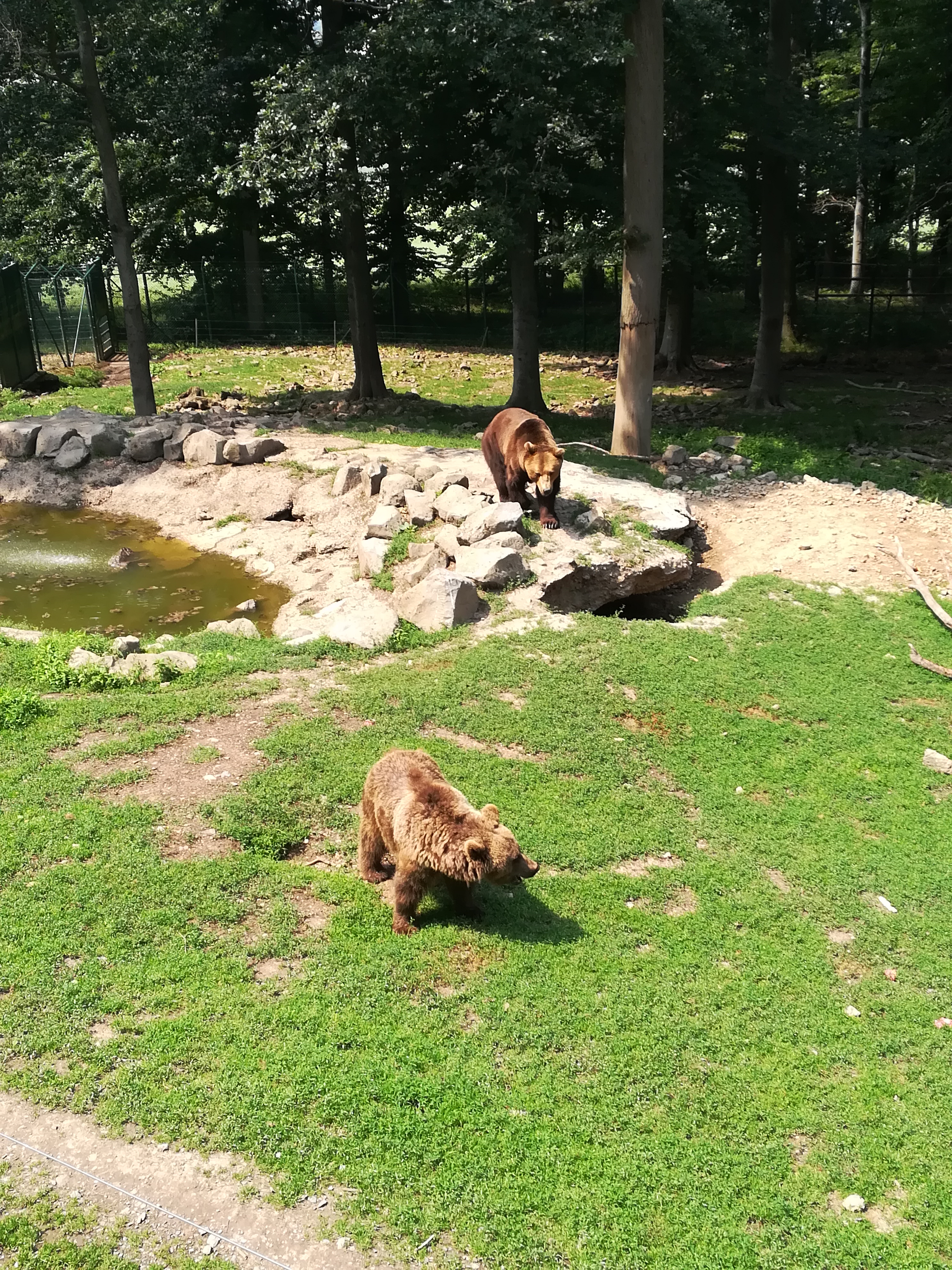 Bären in der Bären- und Wolfsanlage des Wildpark Knüll